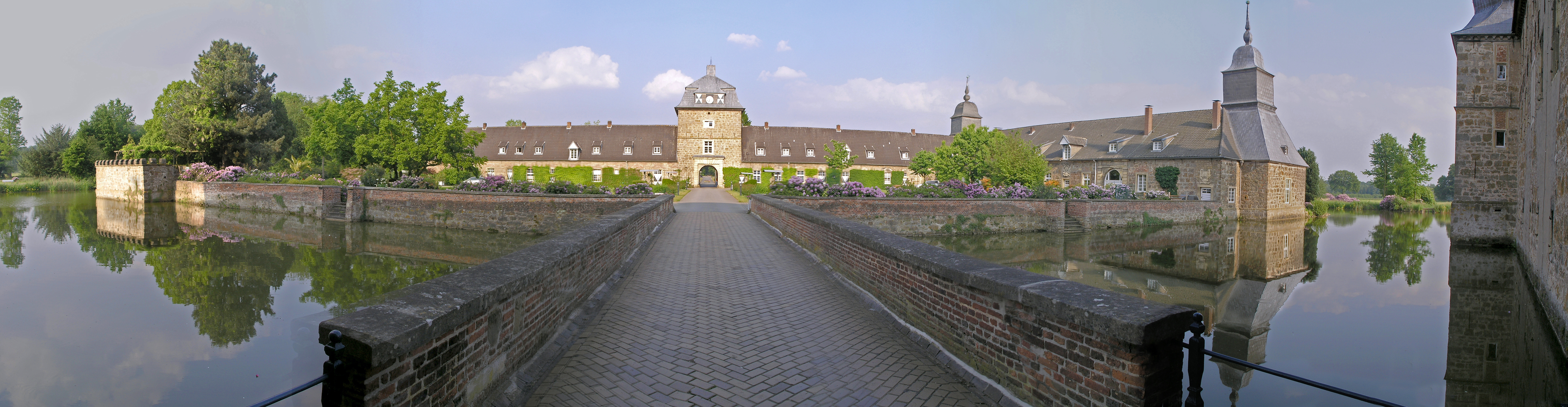 Северный Рейн-Вестфалия, Дорстен - Замок Лембек